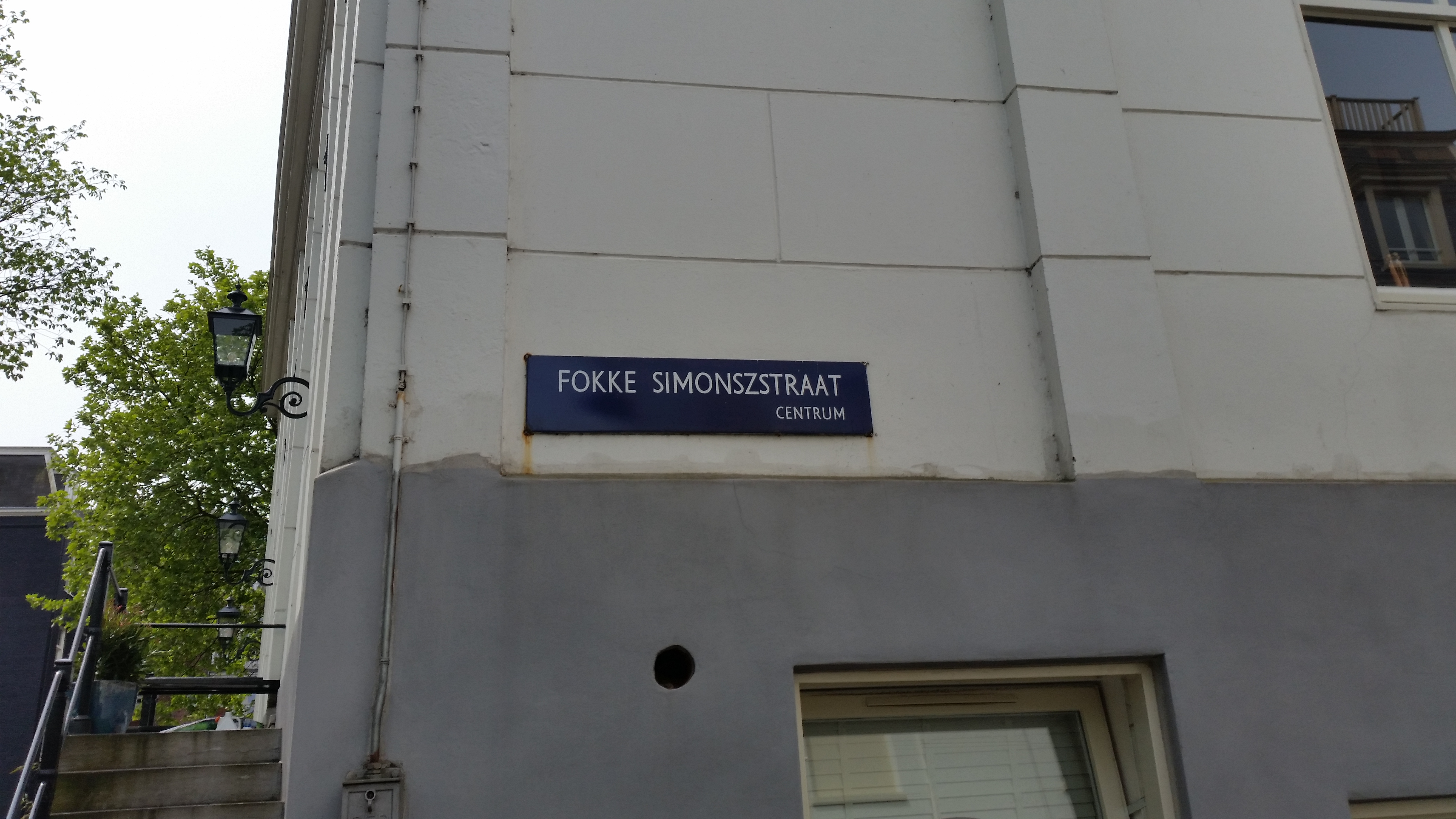 Impressie van de Fokke Simonszstraat, Amsterdam-Centrum